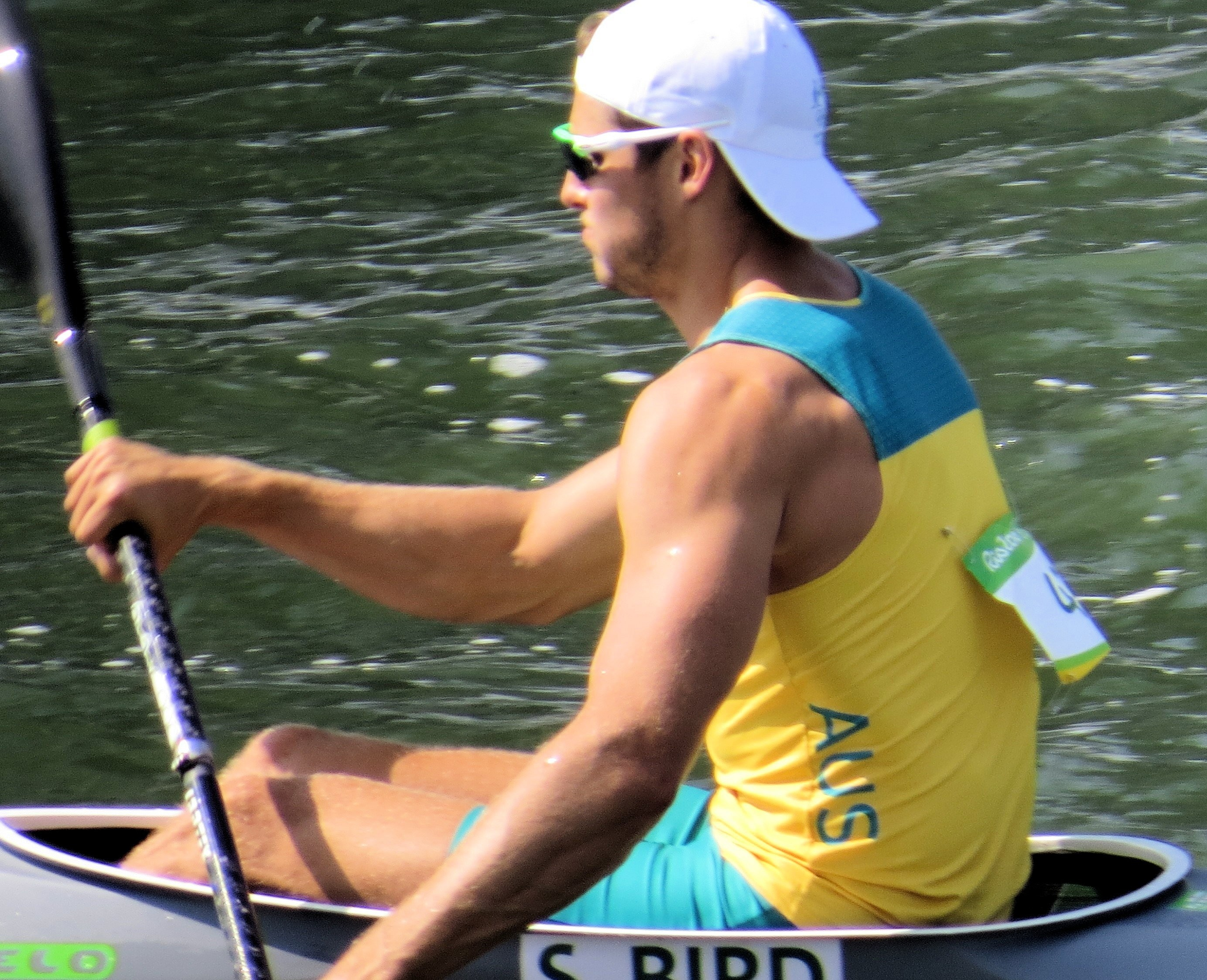 Sx50